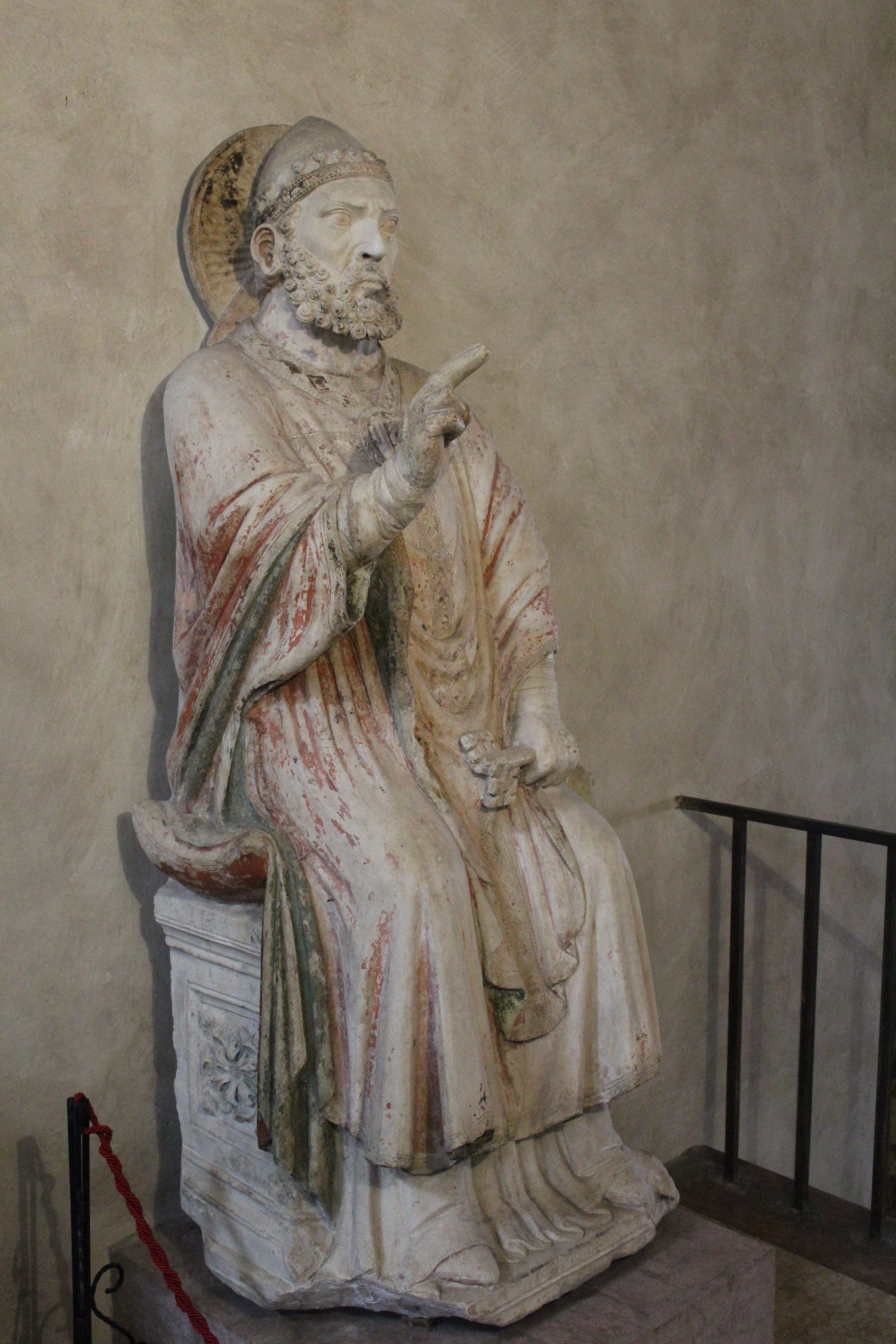 Interno della chiesa di Santo Stefano a Verona